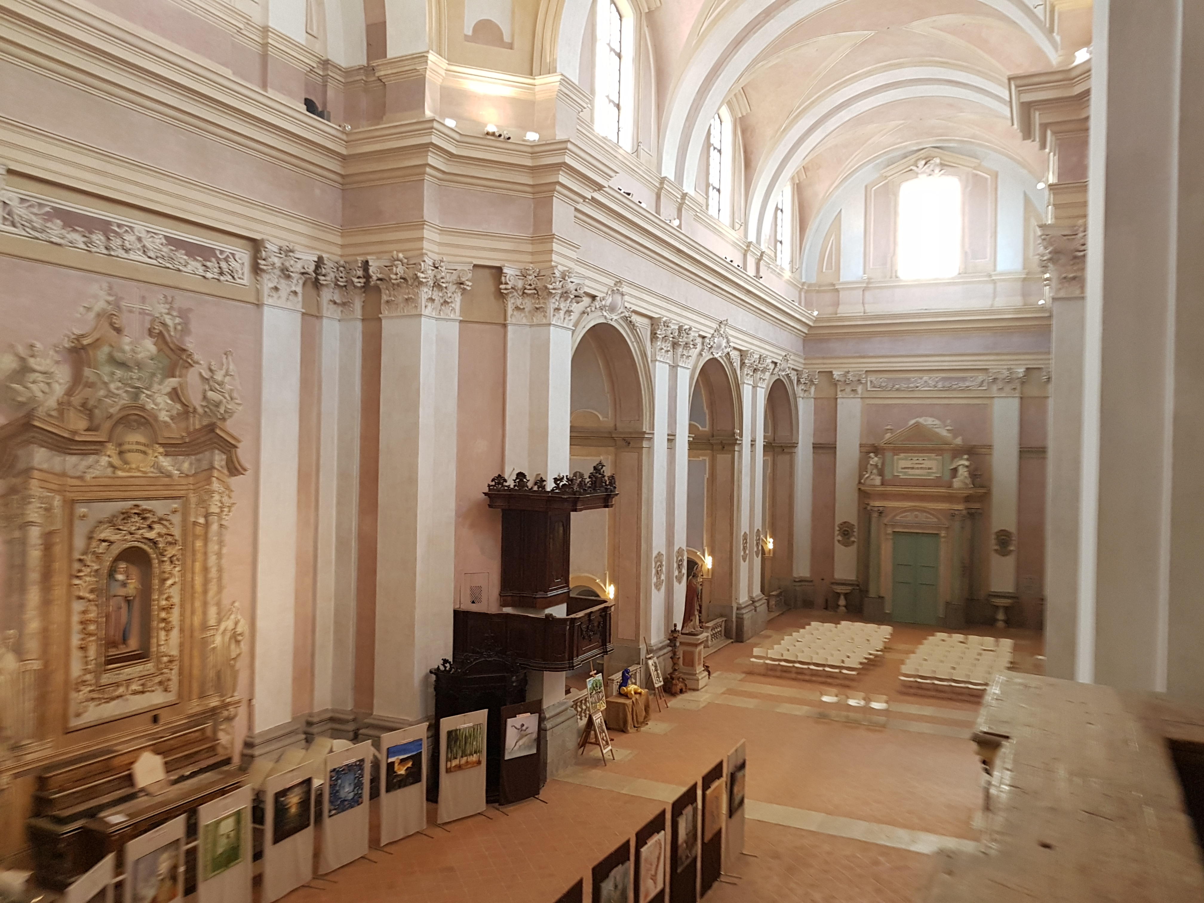 Navata dalla Cantoria